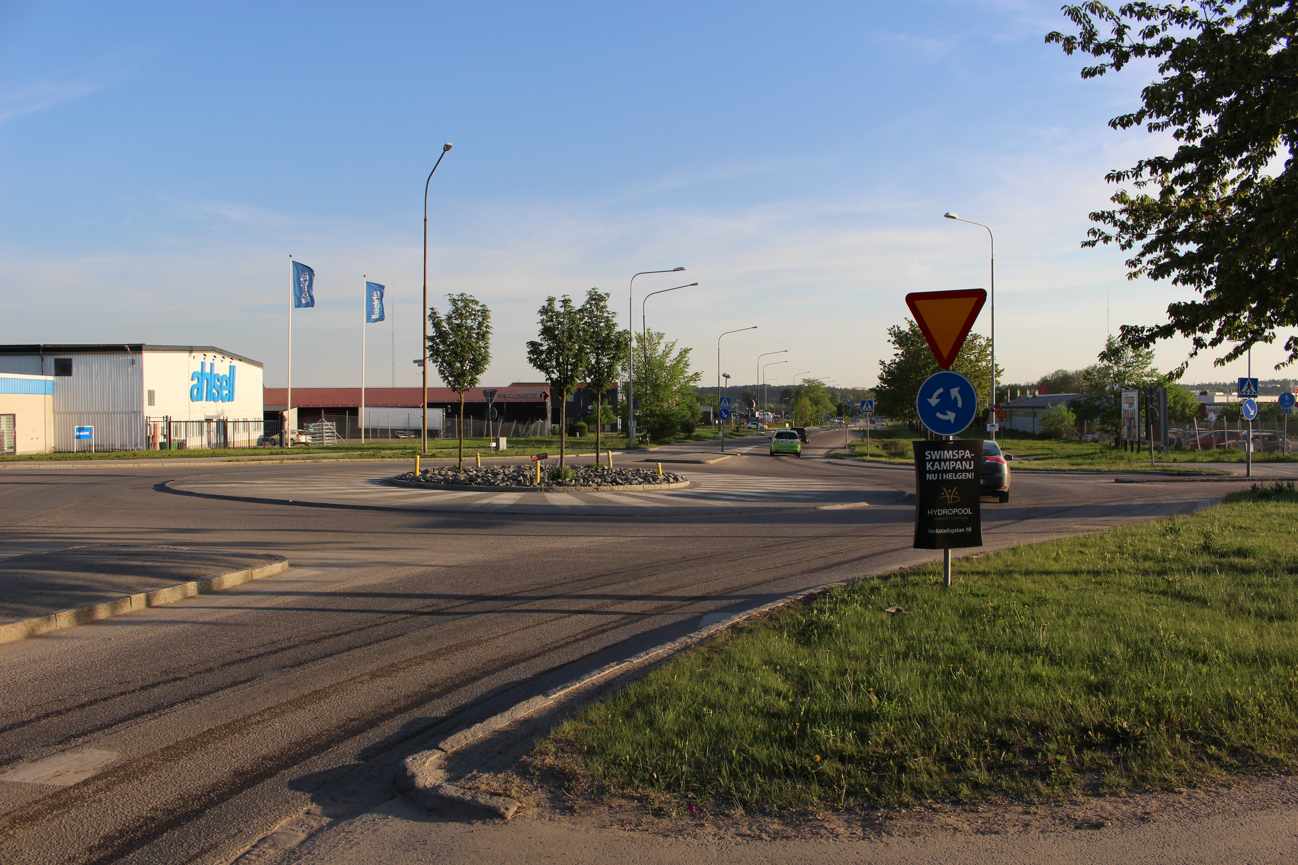 Stålgatan, Uppsala, Sverige.